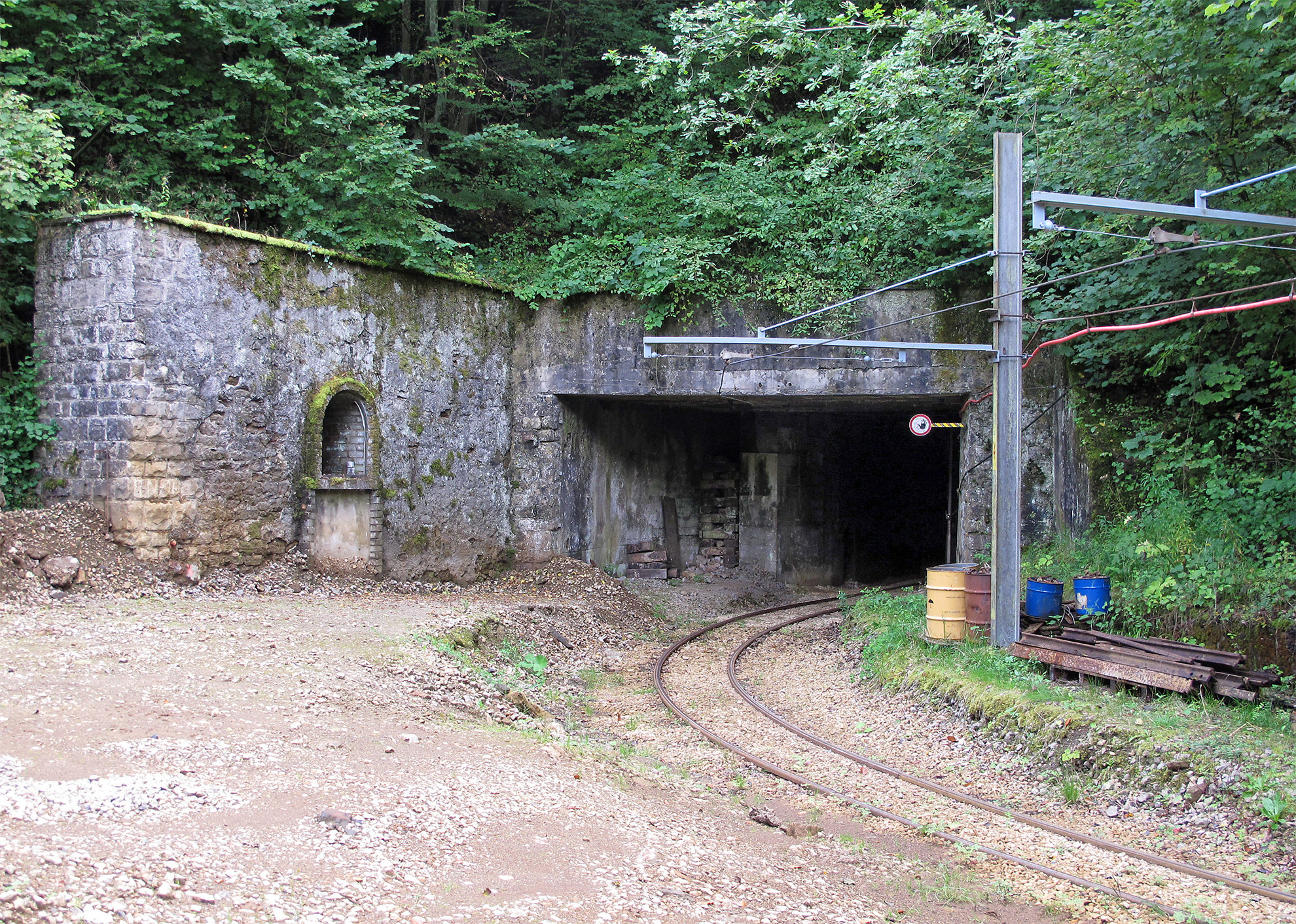 Nr. 68-5: De Site vun der aler Minière Duel mat den ale Vestiairen; d'Statioun vum Depart vun der Minières-Seelbunn; de Sall mat de Kompresseren an der Héichspannungsanlag; d'Gebai mam Concasseur